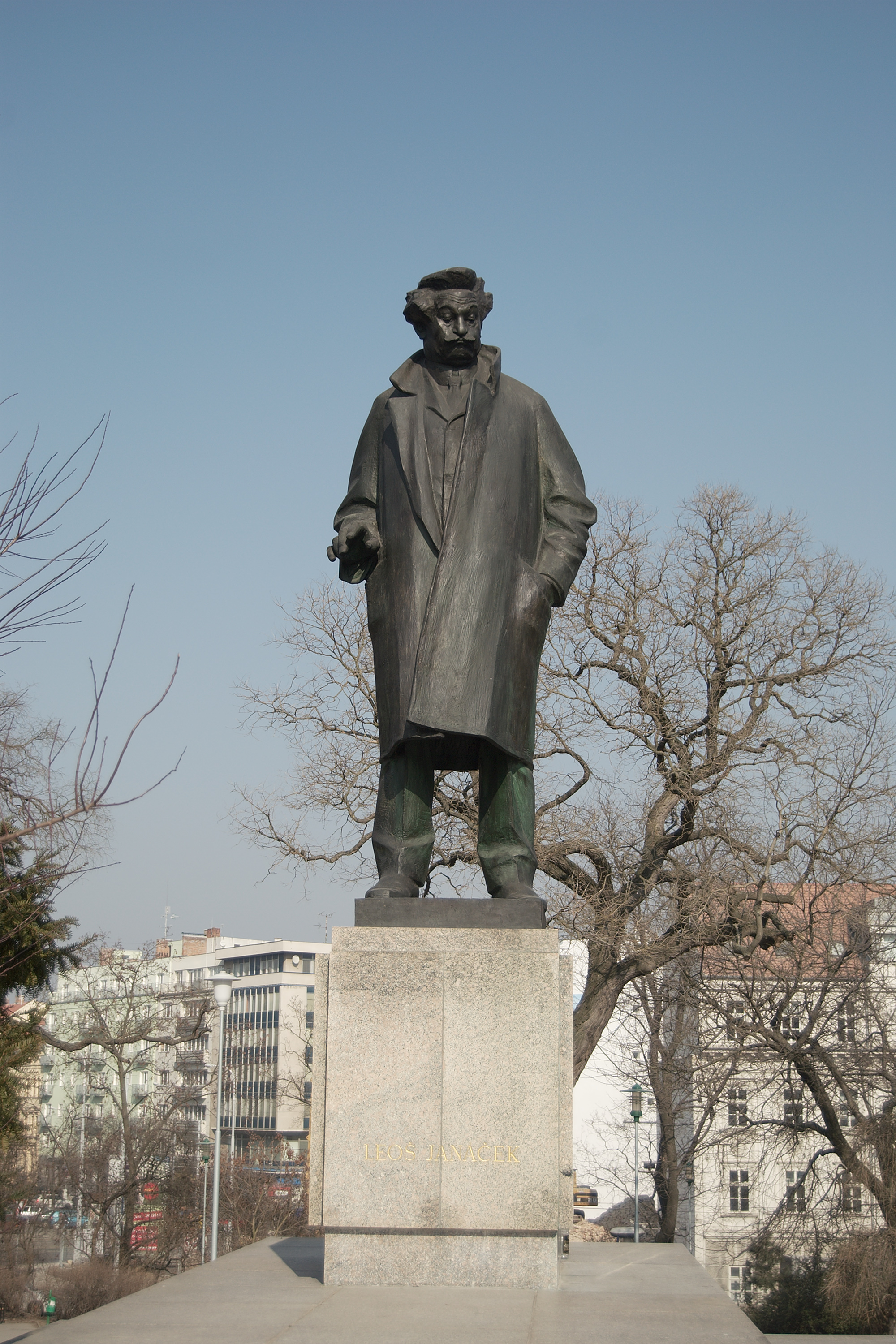 Město Brno - socha Leoše Janáčka u Janáčkova divadla